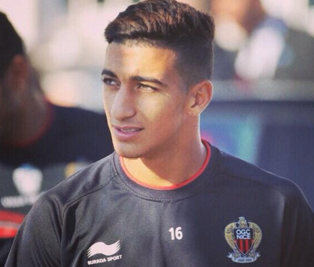 l'algerien au nice